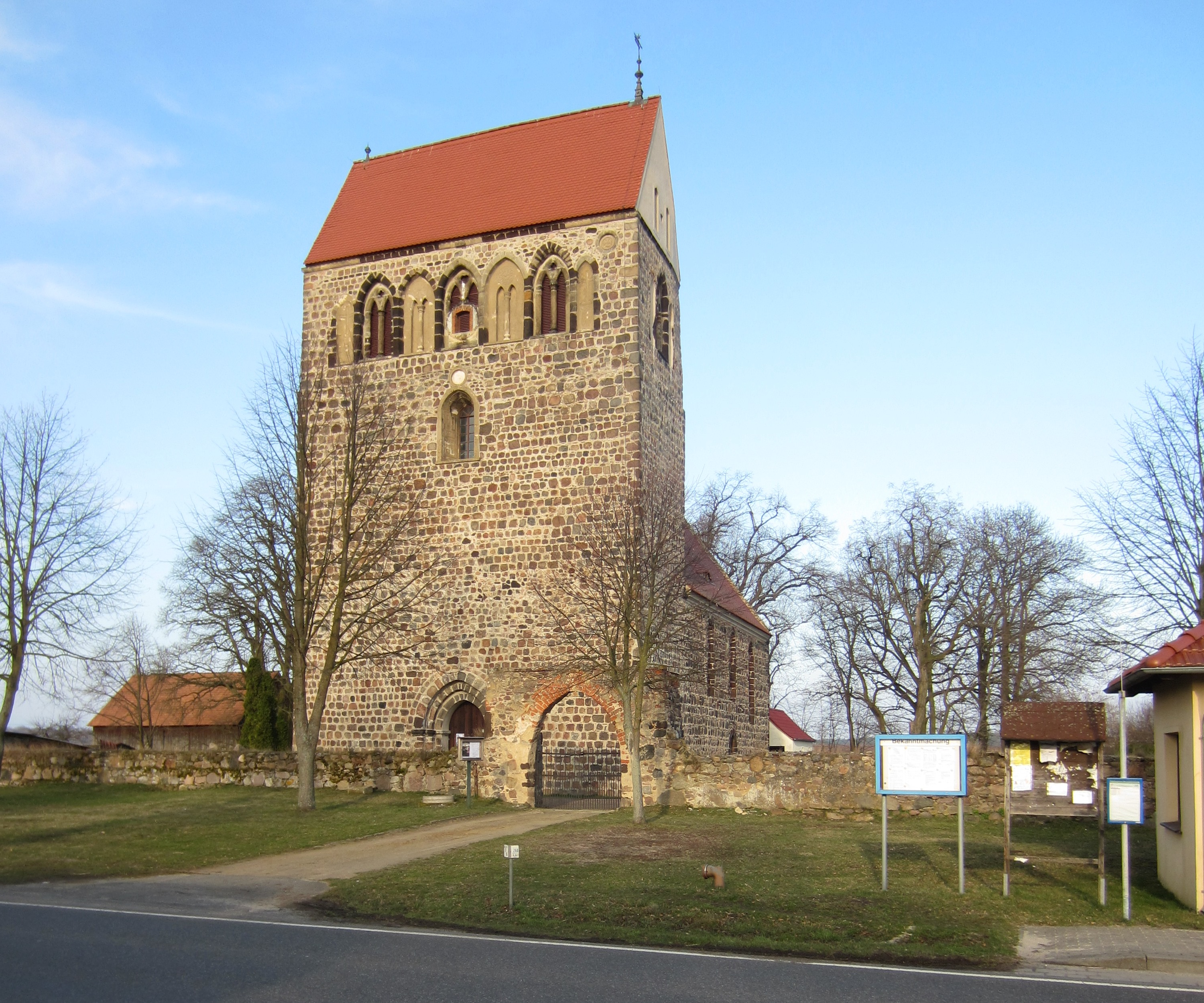 Riedebeck, Gemeinde Heideblick, denkmalgeschützte Dorfkirche, Ansicht von Südwesten